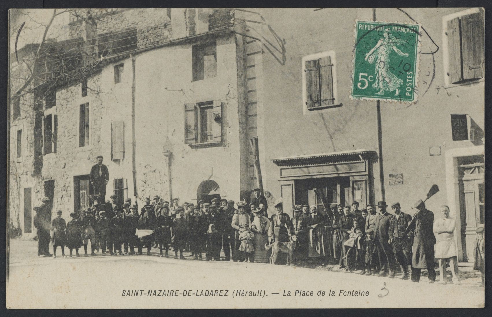 Saint-Nazaire-de-Ladarez. - La place de la fontaine : carte postale.